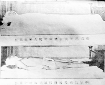 张宗昌手术及遗体